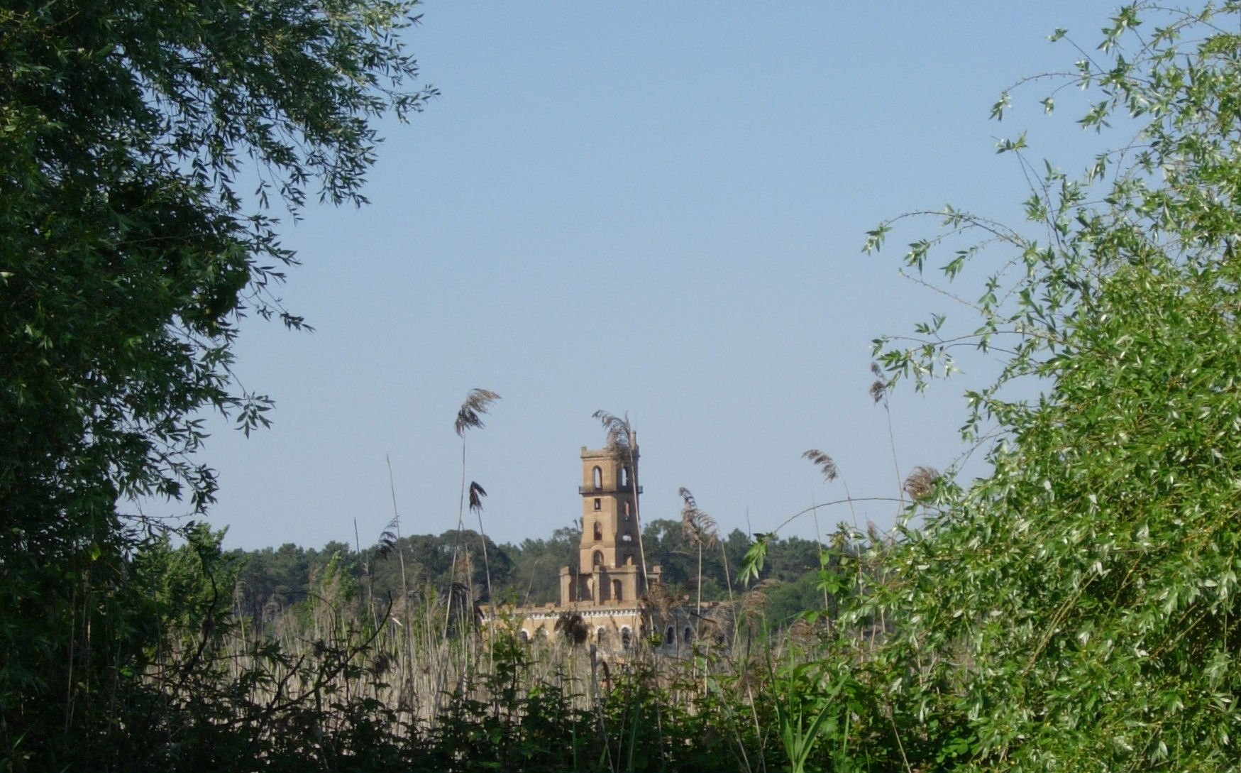 Quinta do Inferno / Quinta de São Vicente / Torre de Coina / Castelo do Rei do Lixo / Palácio do Rei do Lixo. Portugal, Setúbal, Barreiro, Coina. EN 10-3, Hoje fui ao centro comunitário de Coina e consegui descobrir o seguinte: 1º dono: Sr. Martins conhecido como o "Rei do Lixo". o lixo era o estrume utilizado para fertilizar as terras e vinha em barcos da zona de lisboa. o homem era podre de rico e decidiu construir o palacete para poder ver todas as terras à sua volta. 2º dono: Dr. Ramada Curto advogado. não sei mais nada. 3º dono: Sr. Mota construtor e dono de fábricas de peles em alcanena. 4º e actual dono: Sr. António Xavier de Lima construtor e dono de quase tudo o que é terreno nesta e noutras zonas à volta do concelho do seixal. actualmente o palacete é utilizado para guardar cavalos!!! o actual dono pensa em urbanizar toda a zona onde está o palacete, pelo que o seu futuro é para lá do negro... bom, tudo isto foi-me gentilmente contado por uma Srª lá do centro que nasceu em coina. vou tentar pesquisar e confirmar, ou não, estas informações...palacete